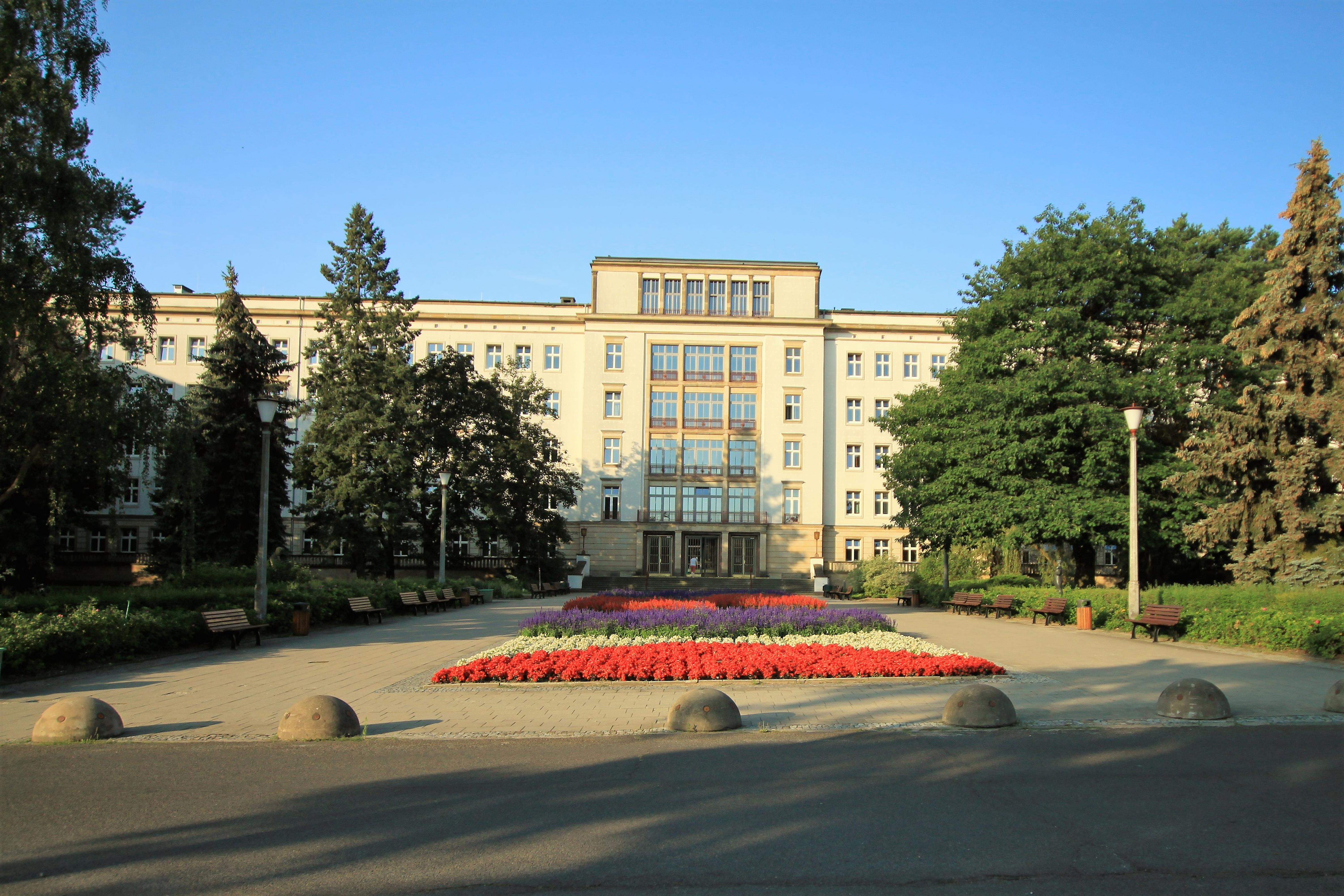 Hauptgebäude des Krankenhauses